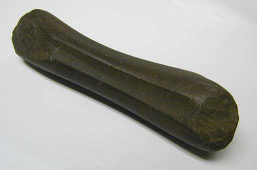 Lårbensformad slipsten tillhörande den svensk-norska stridsyxekulturen, med fyndort i södra Sverige. Slipstenen hittades 1929 på Frälsegårdens ägor i Ravelstorp, Gökhems socken, Vilske härad, Falköpings kommun, f.d. Skaraborgs län, Västergötland, Västra Götalands län, Sverige. Slipstenen skänktes 1931 till Falbygdens museum i Falköping och har där inventarienummer 486:1 (2M16-F0486-01).